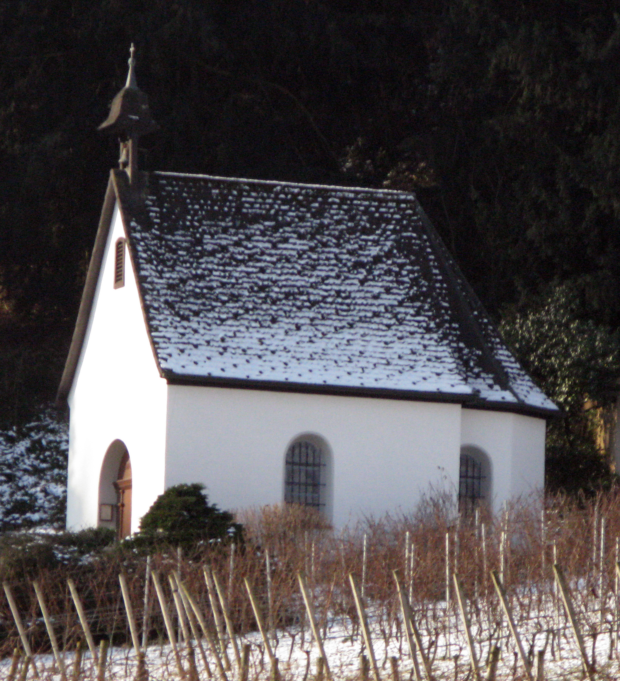 Schönstatt Kapelle